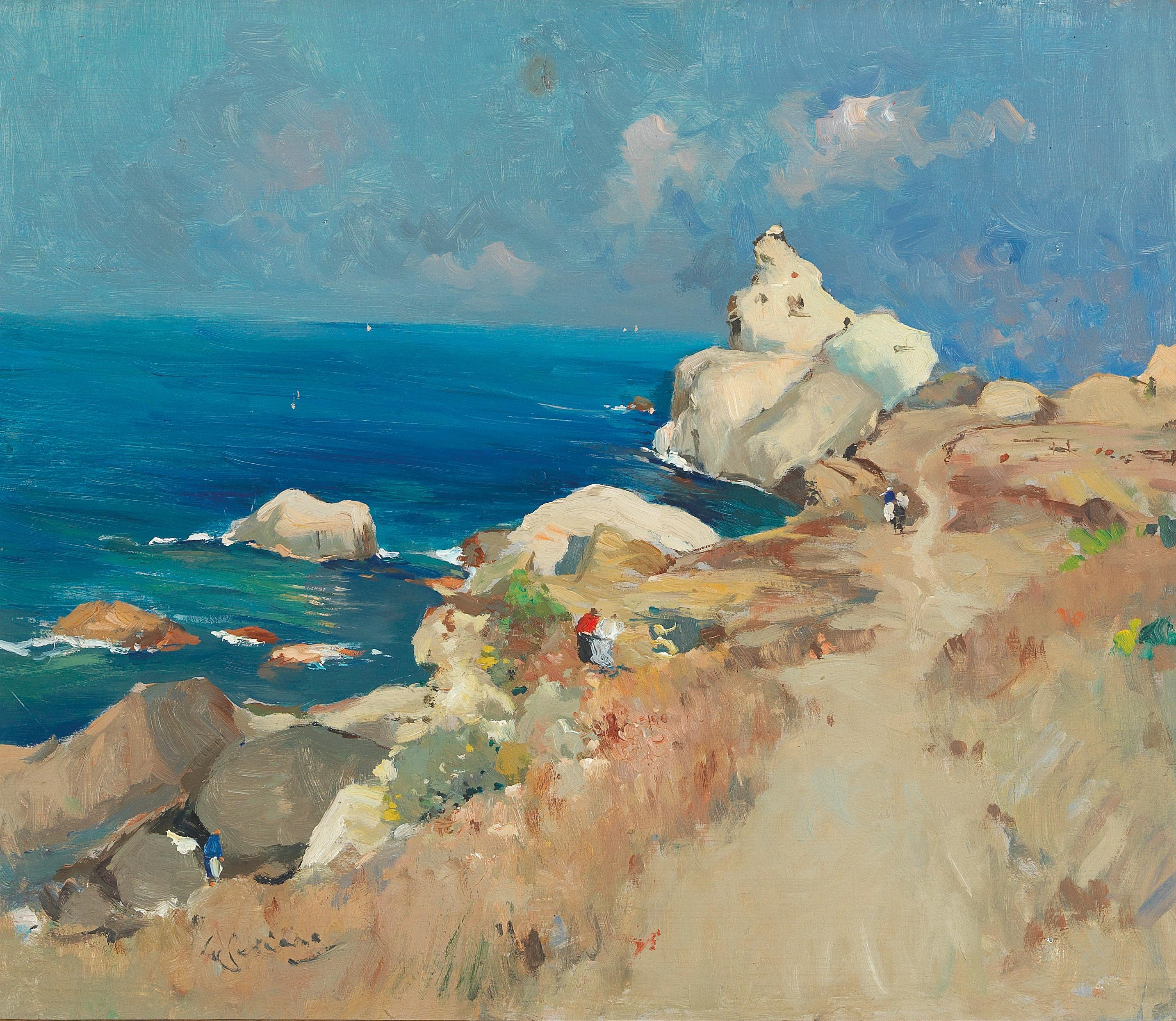 Capri, rückseitig Stempel Giuseppe Casciaro Napoli, signiert G. Casciaro, Öl auf Holz, 52 x 61 cm